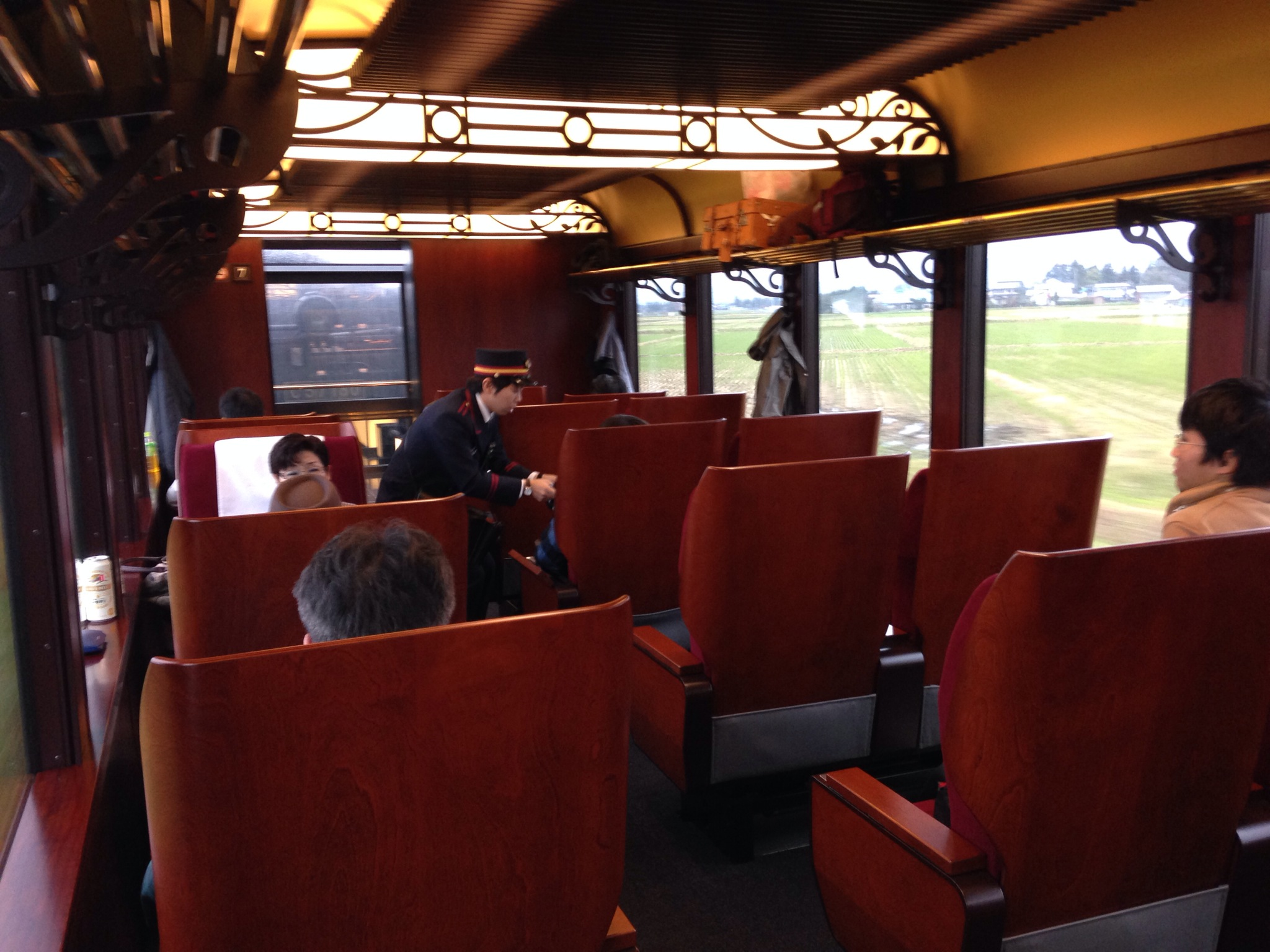 ばんえつ物語 グリーン車内